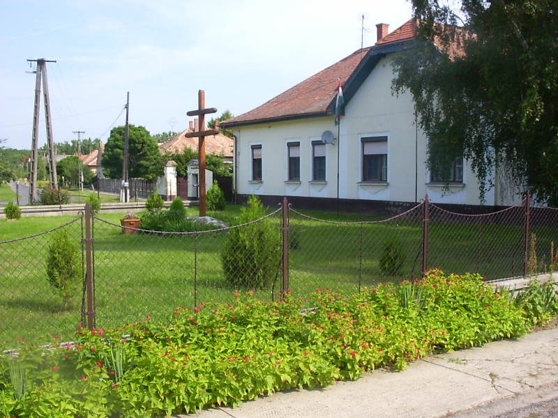 Egyed település közigazgatási centruma, a községháza